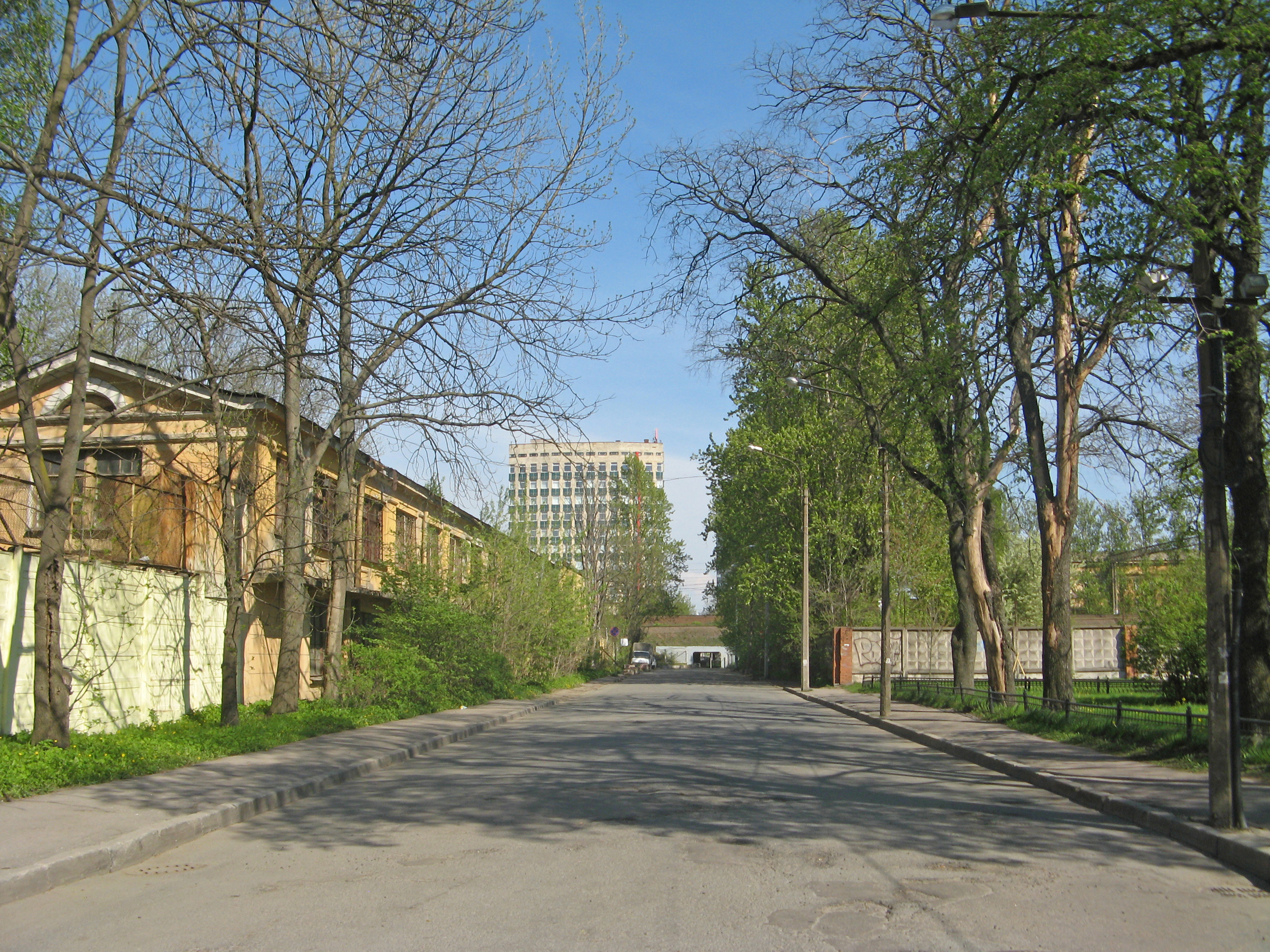 Санкт-Петербург, улица Капитана Воронина